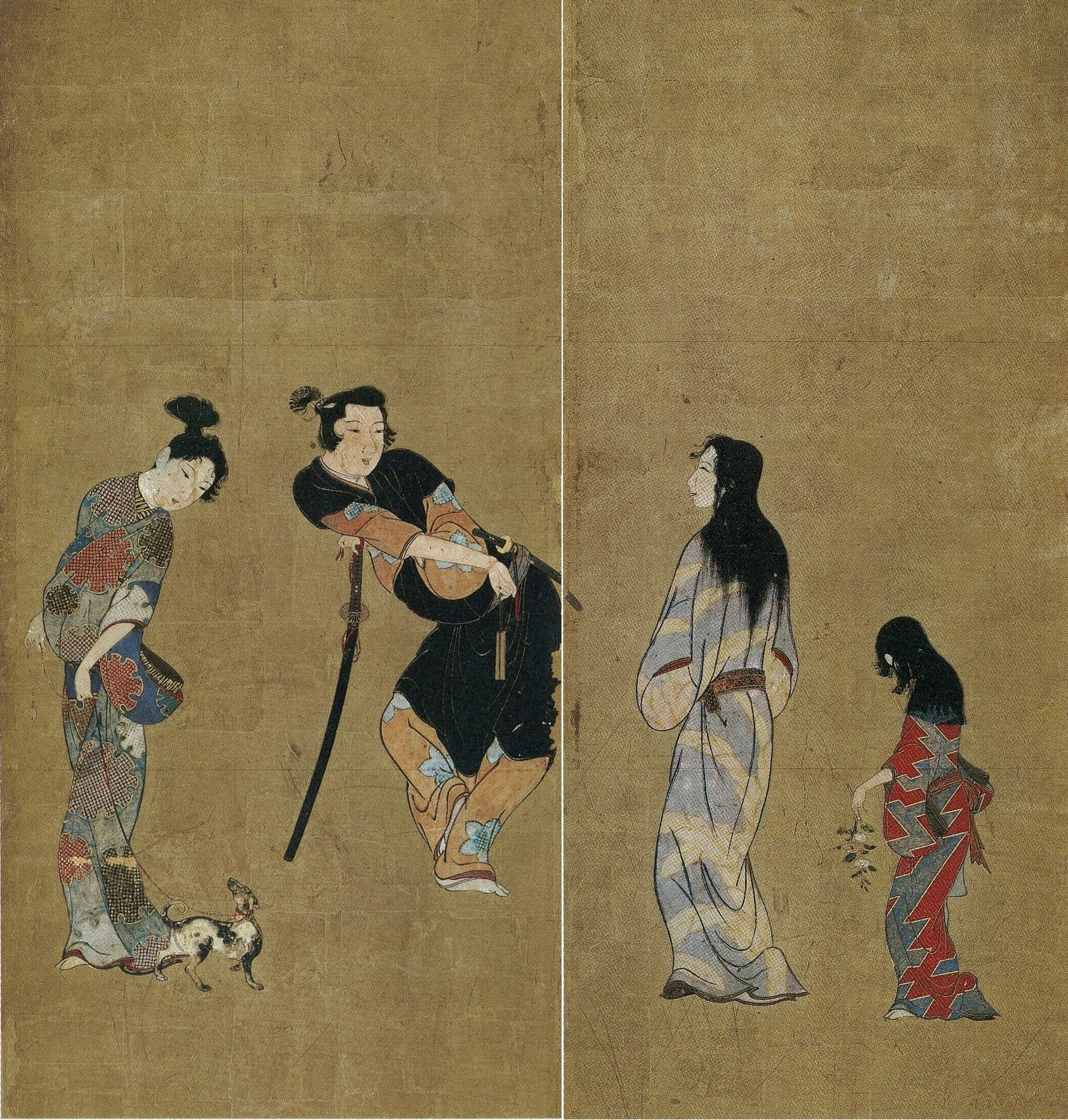 Hikone screen 5 and 6